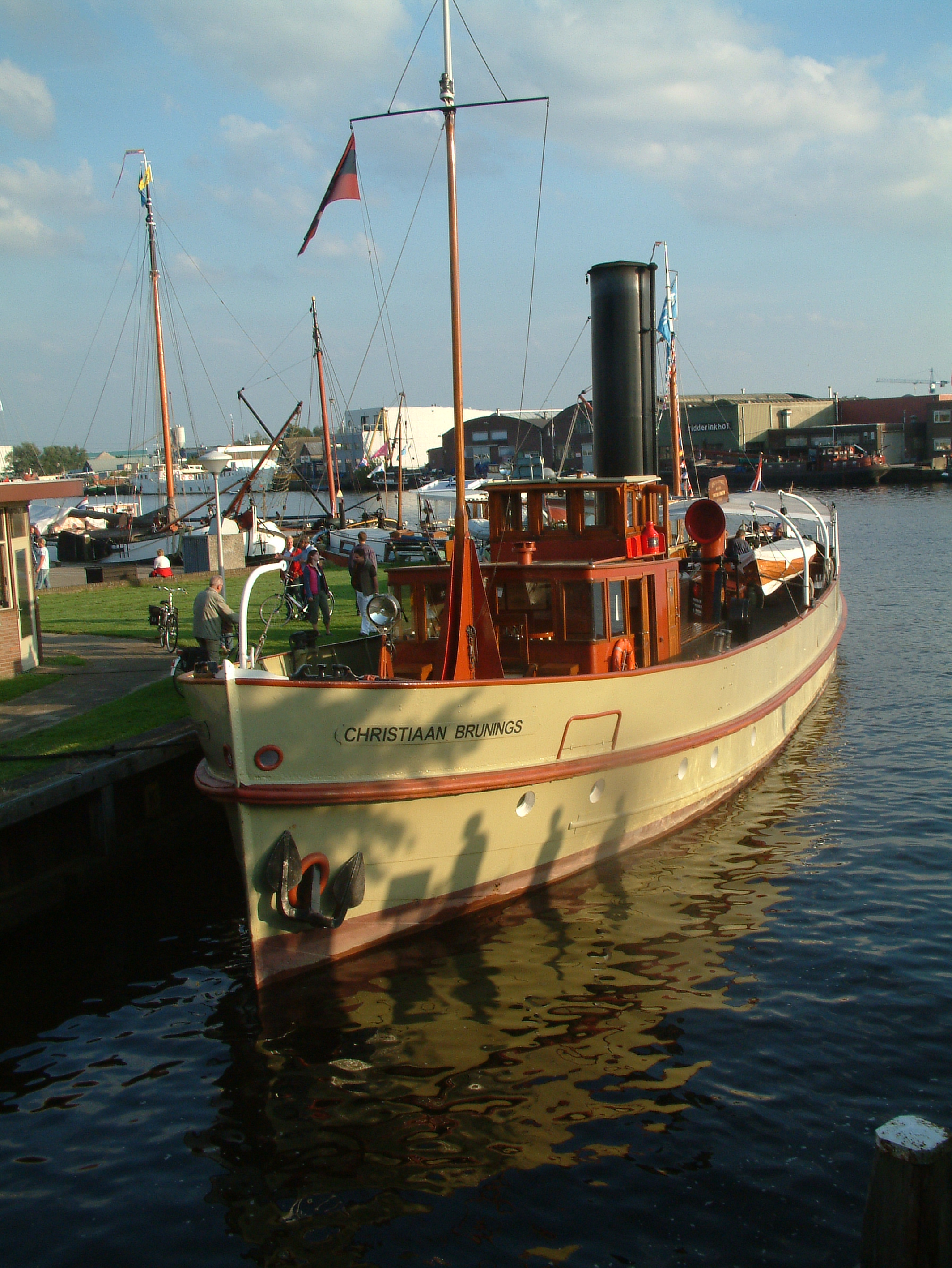 De CHRISTIAAN BRUNINGS in Hasselt (Overijssel).